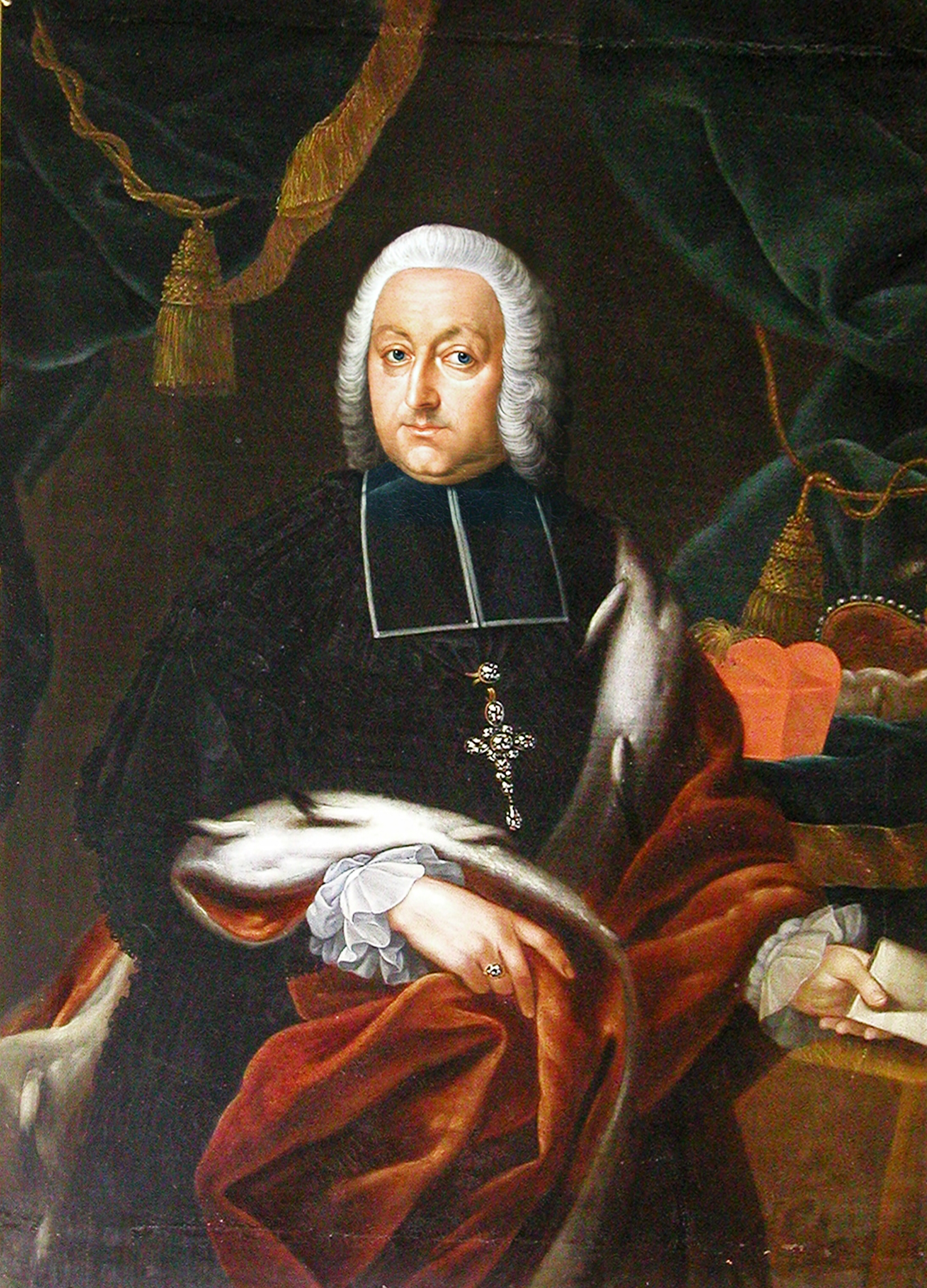 Bildnis des Johann Philipp Anton von und zu Frankenstein (1695-1753), Fürstbischof von Bamberg